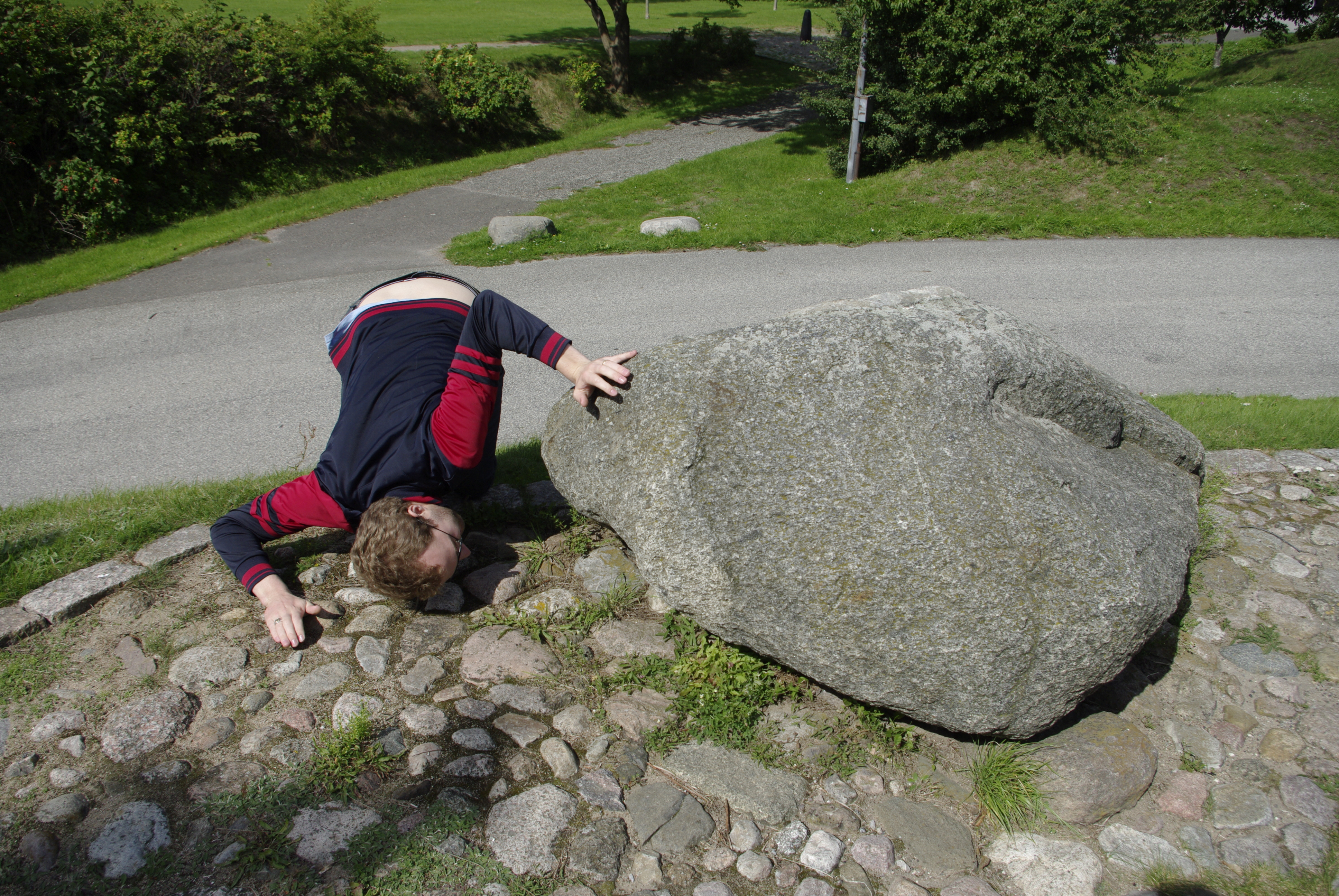 Smygestenen i smygehuk